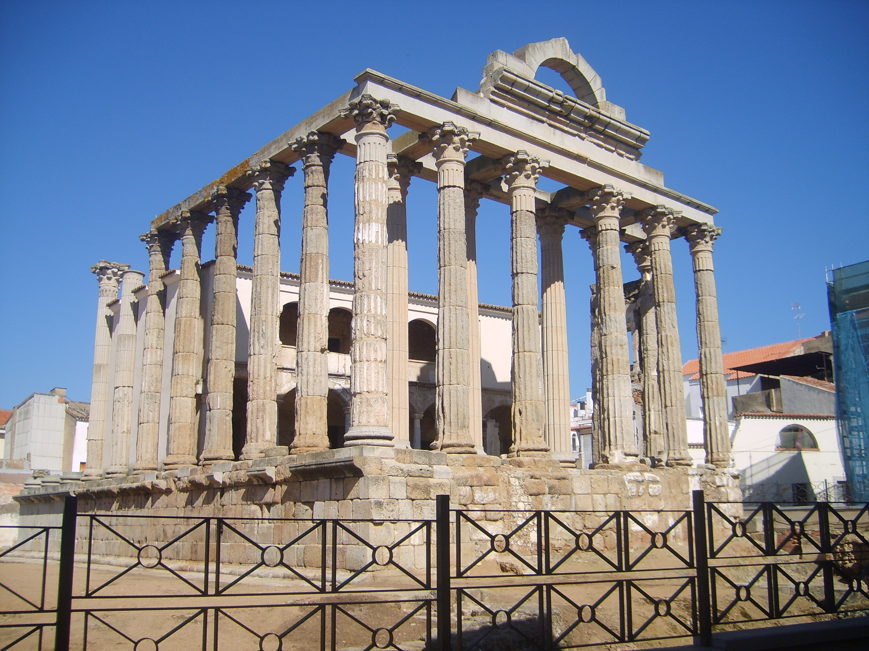 Templo romano de Diana situado em Mérida (Extremadura, Espanha)